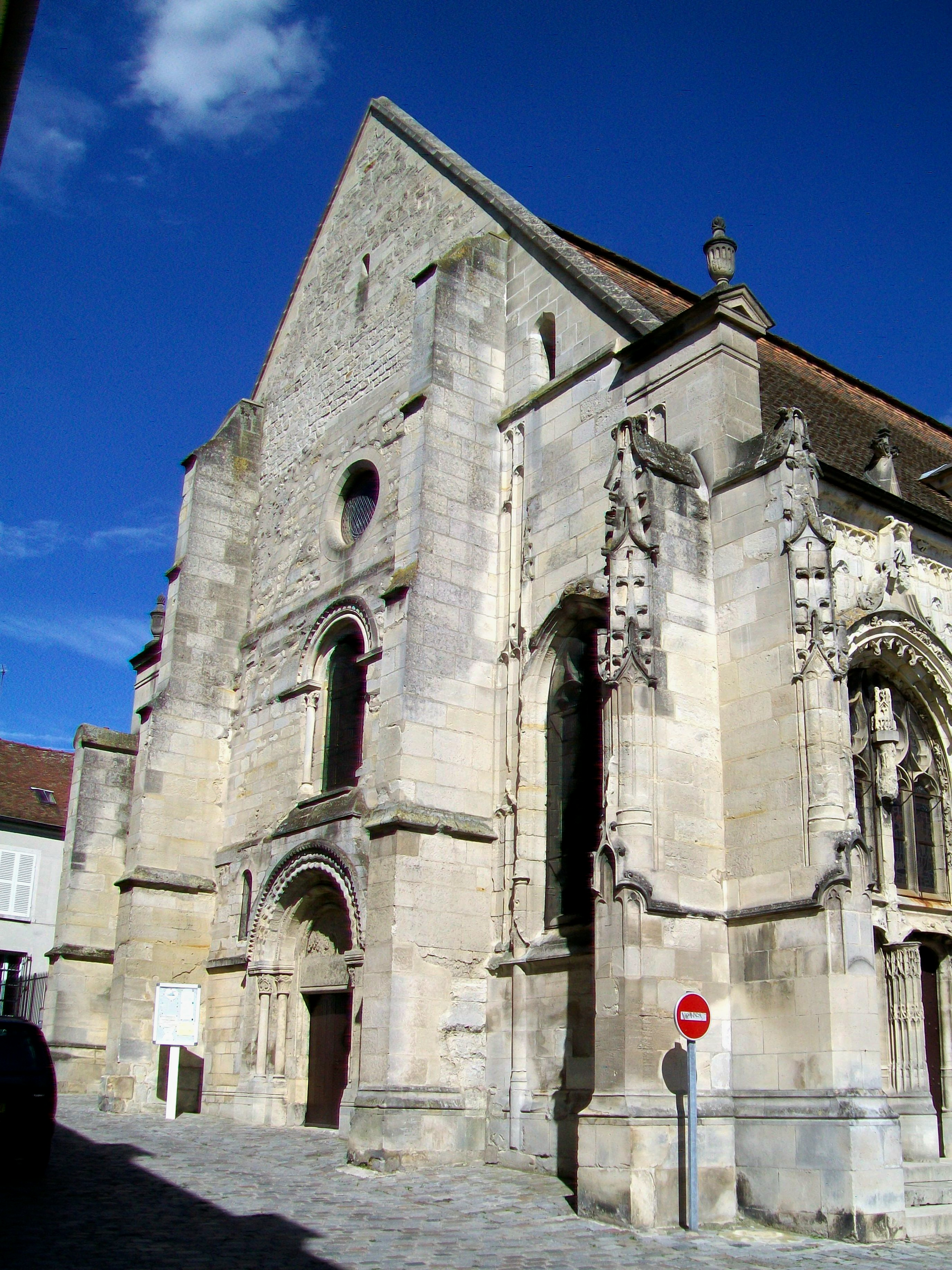 La façade occidentale sur la rue Saint-Justin.